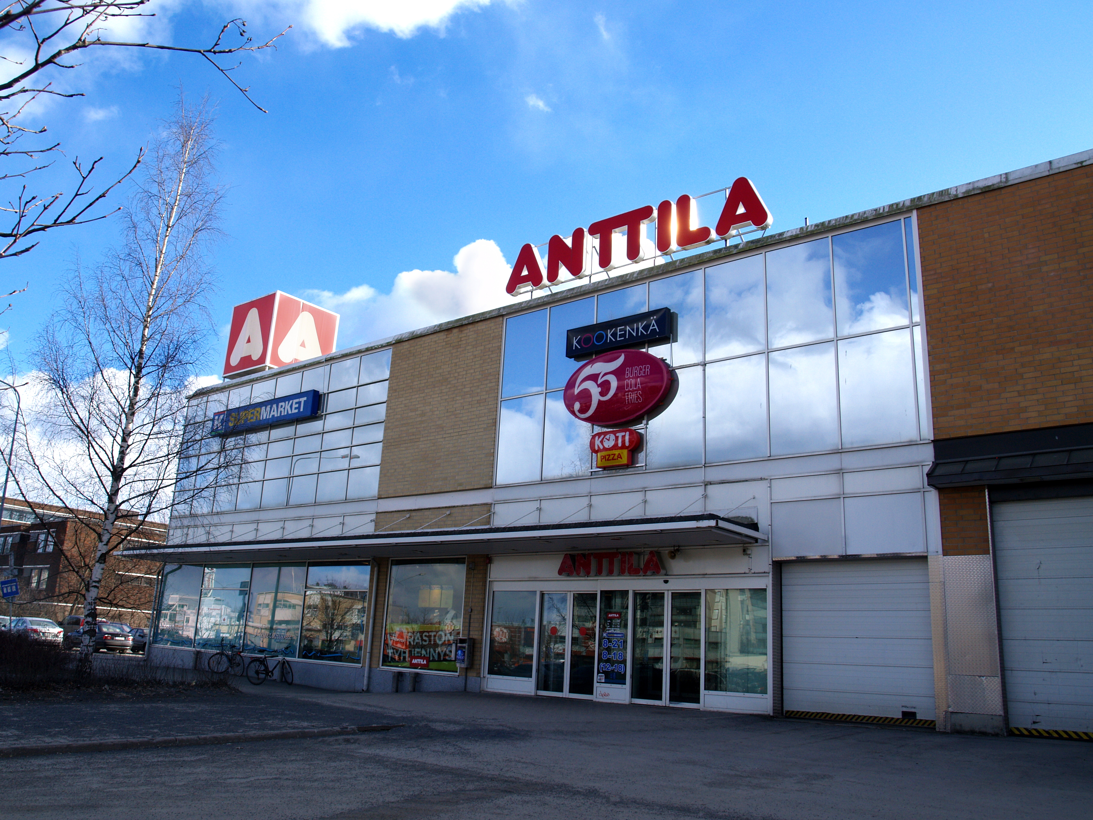 Seinäjoen Anttila, maaliskuussa 2015.